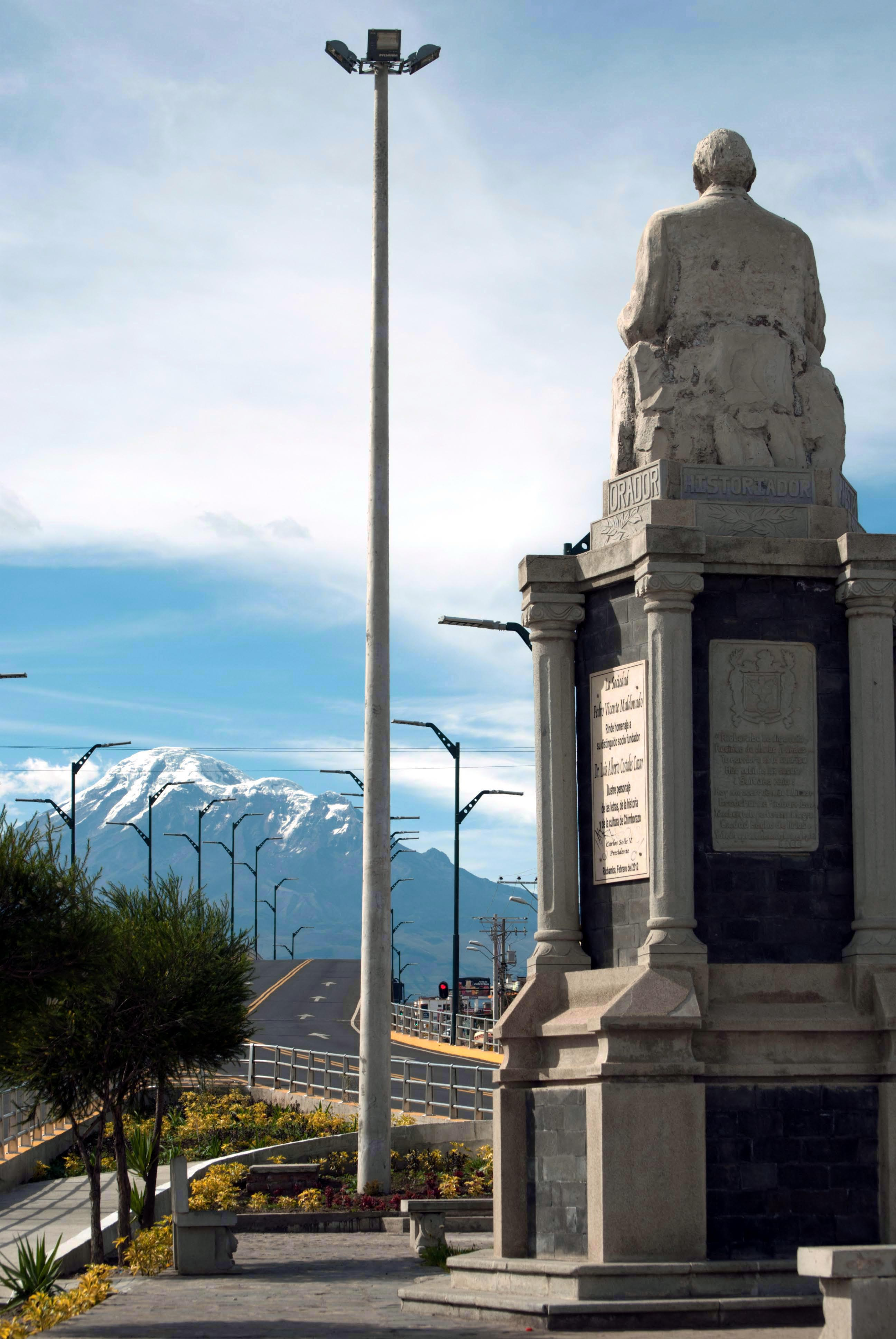 Monumento al escritor Luis Alberto Costales en Riobamba, de fondo el punto terrestre más cercano al espacio exterior superando en 2Km. al Everest medido desde el centro del planeta, el volcán Chimborazo en Ecuador